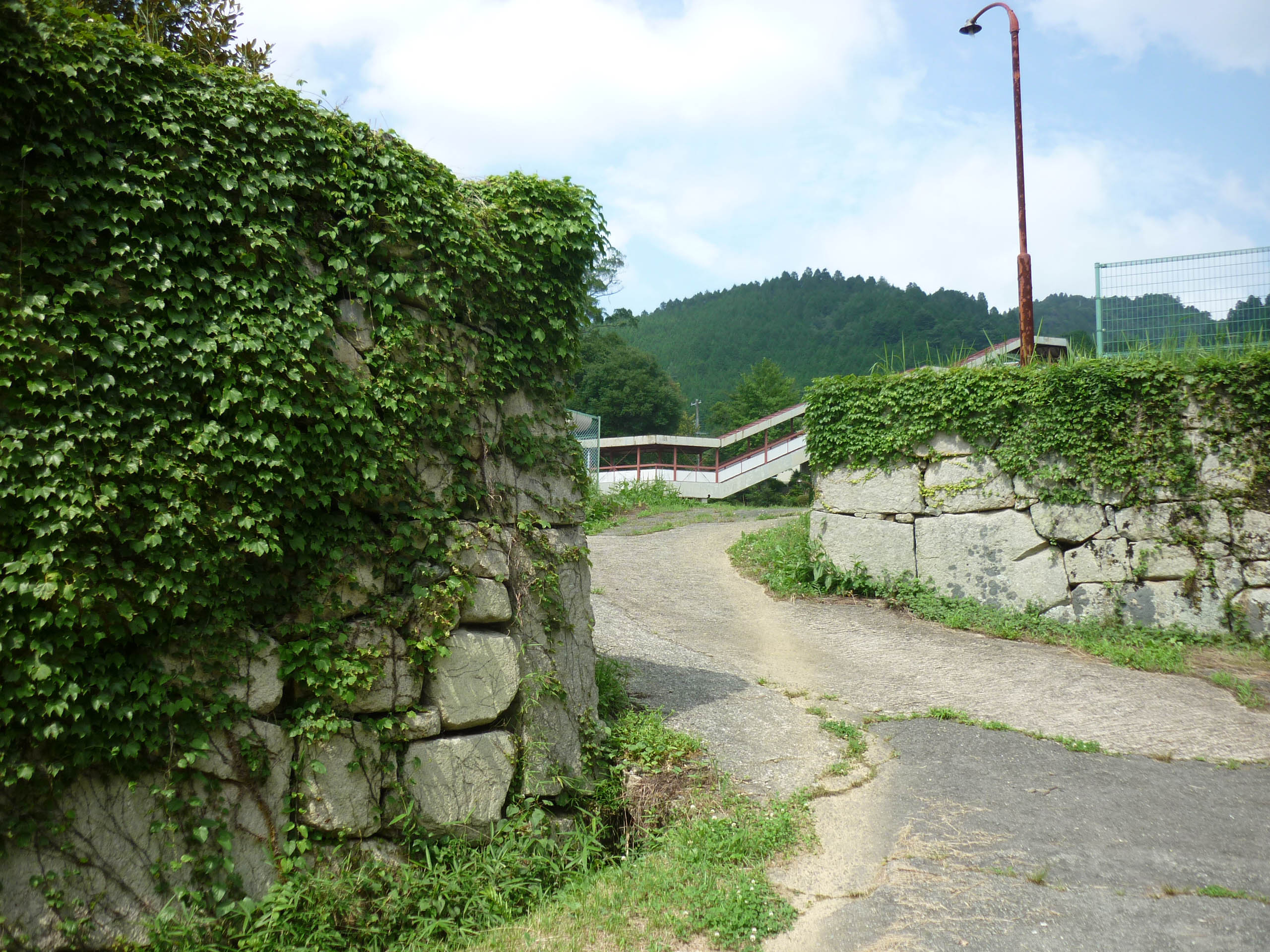 食違虎口